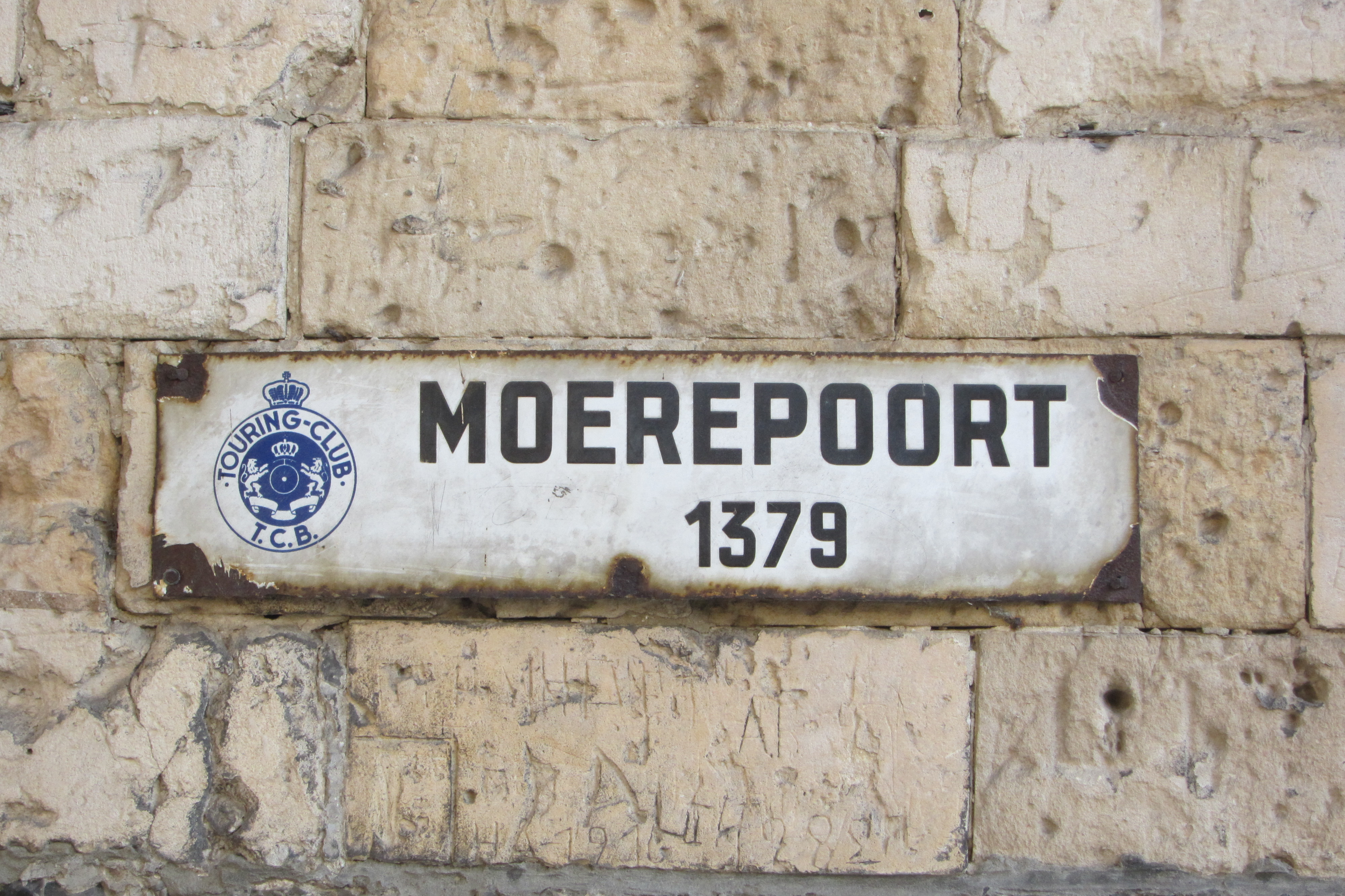 Aanduiding Moerepoort, middeleeuwse stadspoort, Tongeren, België